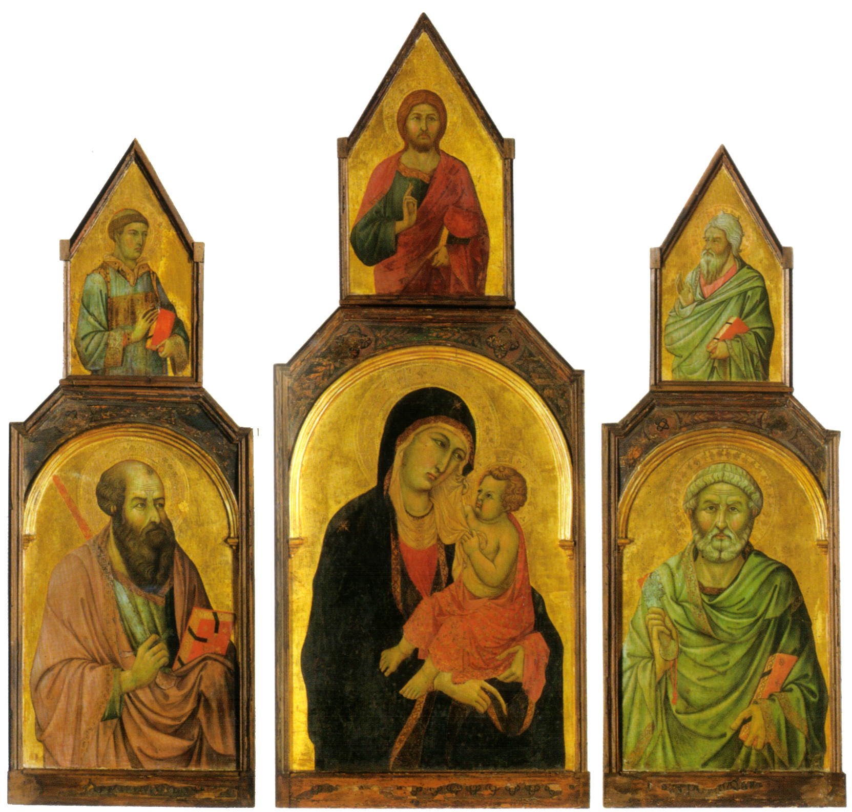 Trittico